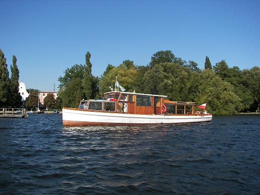 Szczecinecki Tramwaj Wodny "Bayern" (Szczecinek, Zachodniopomorskie)